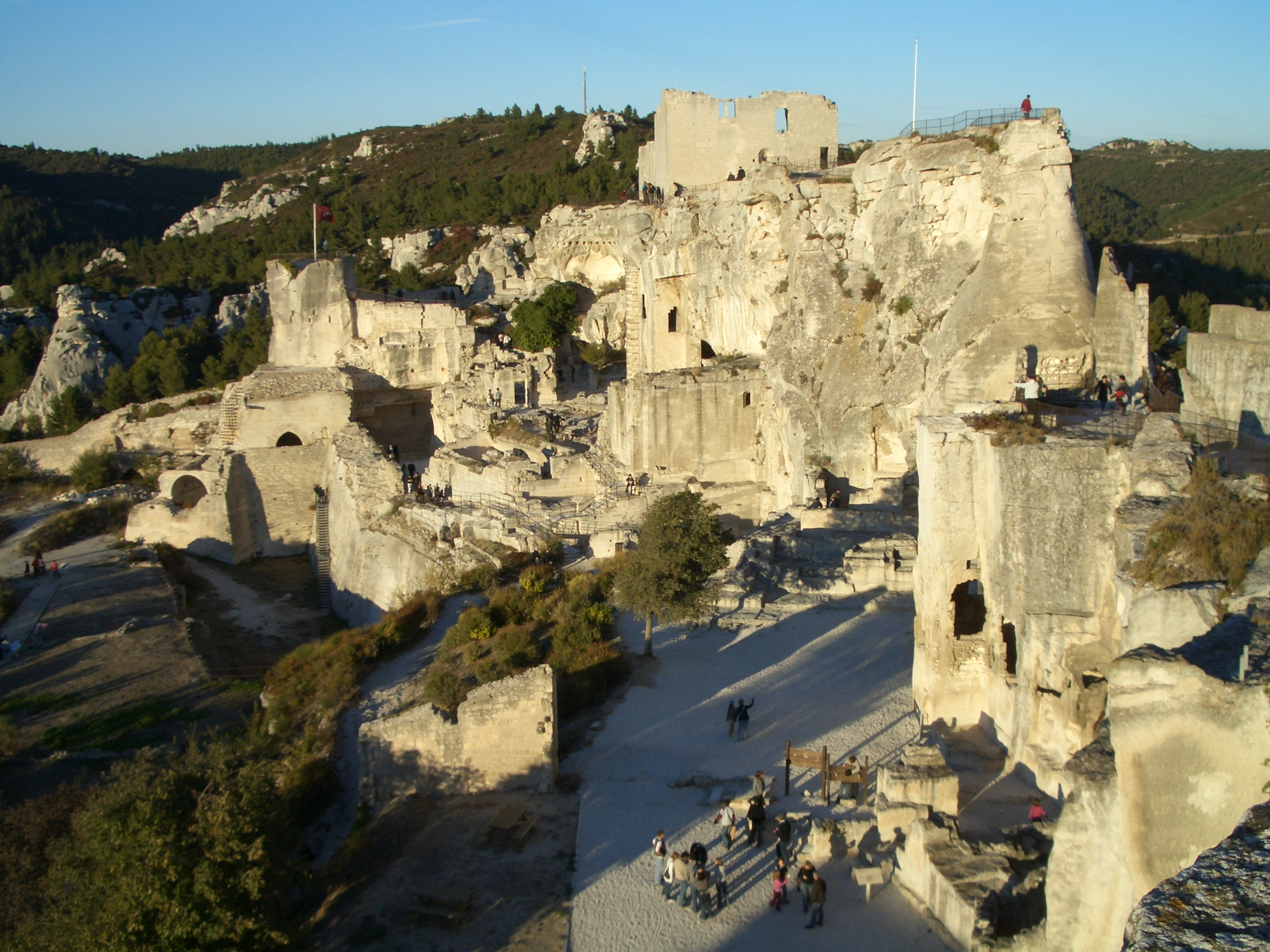 Le château des Baux